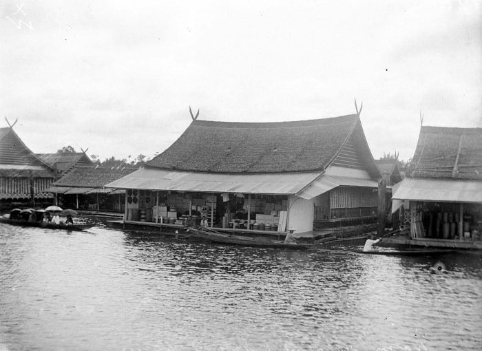 Negatief. Een winkel op een vlot (rakit) tegenover Palembang, Zuid-Sumatra